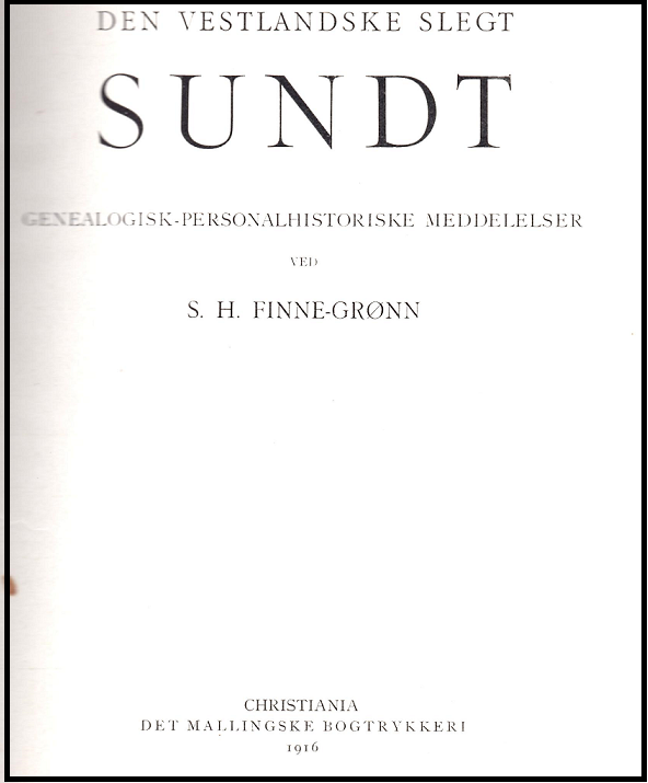 forside av slektboka - 1916